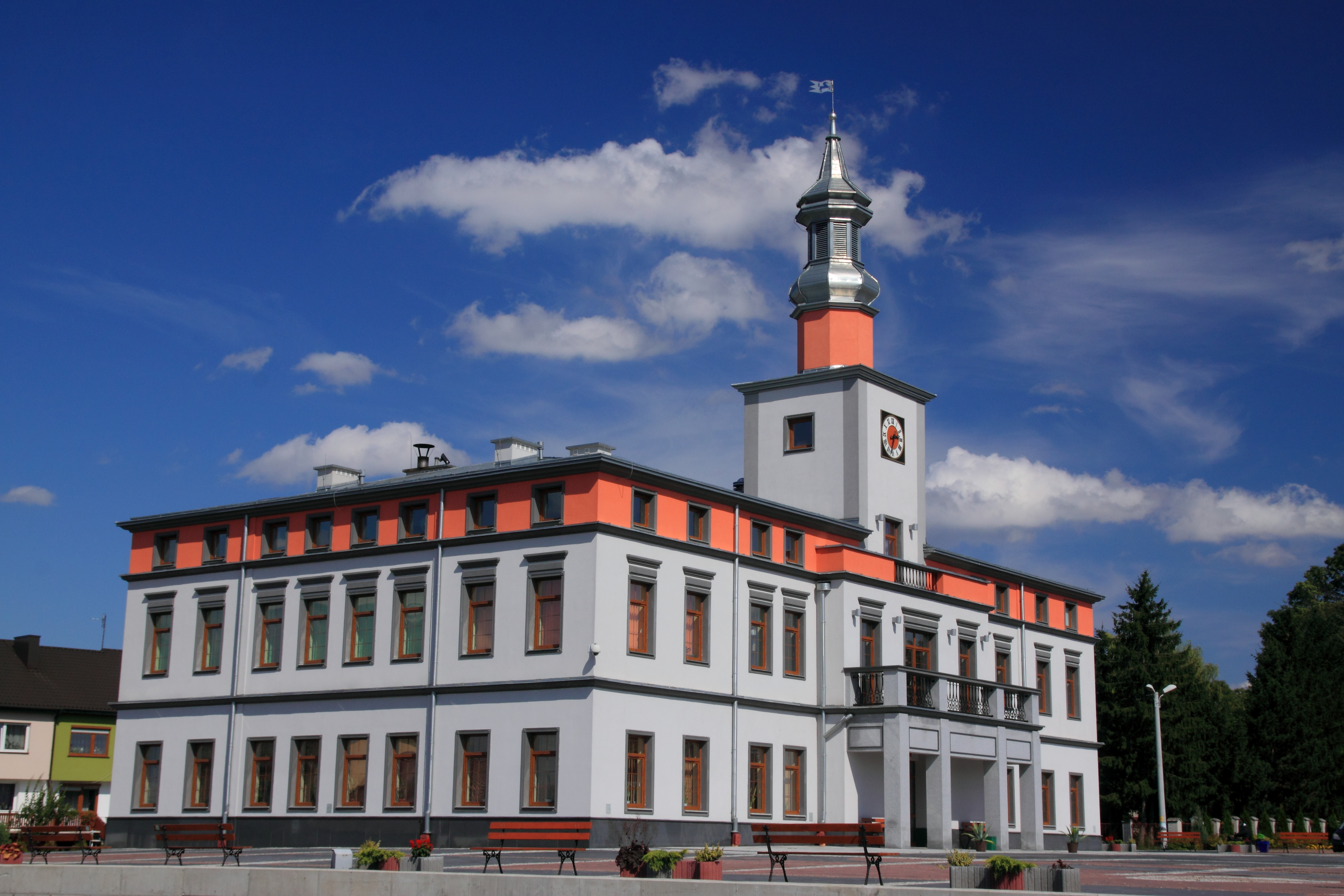 Nowy ratusz w Wojsławicach